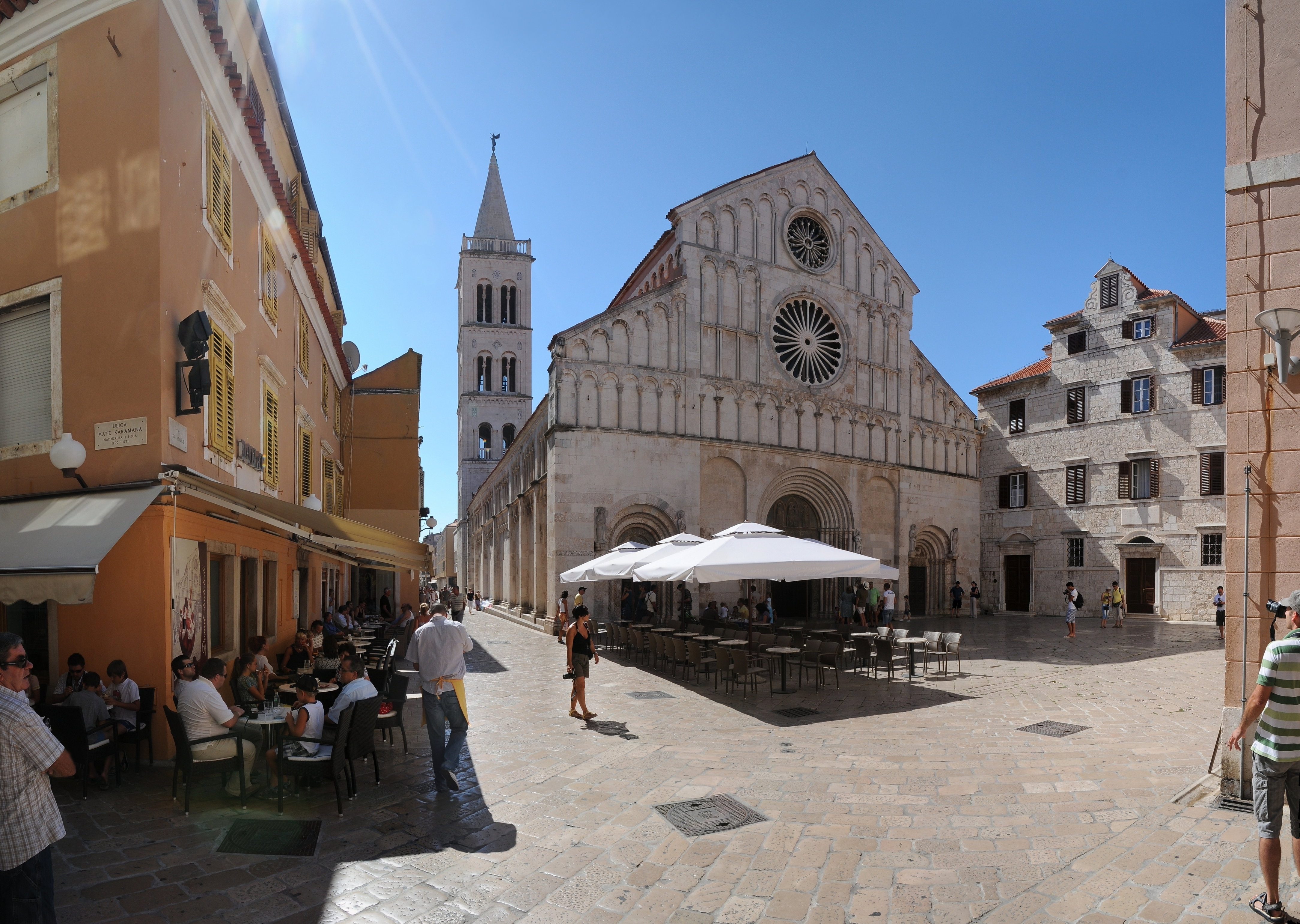 Panoramaaufnahme: Kathedrale der Hl. Anastasia in der Altstadt von Zadar.